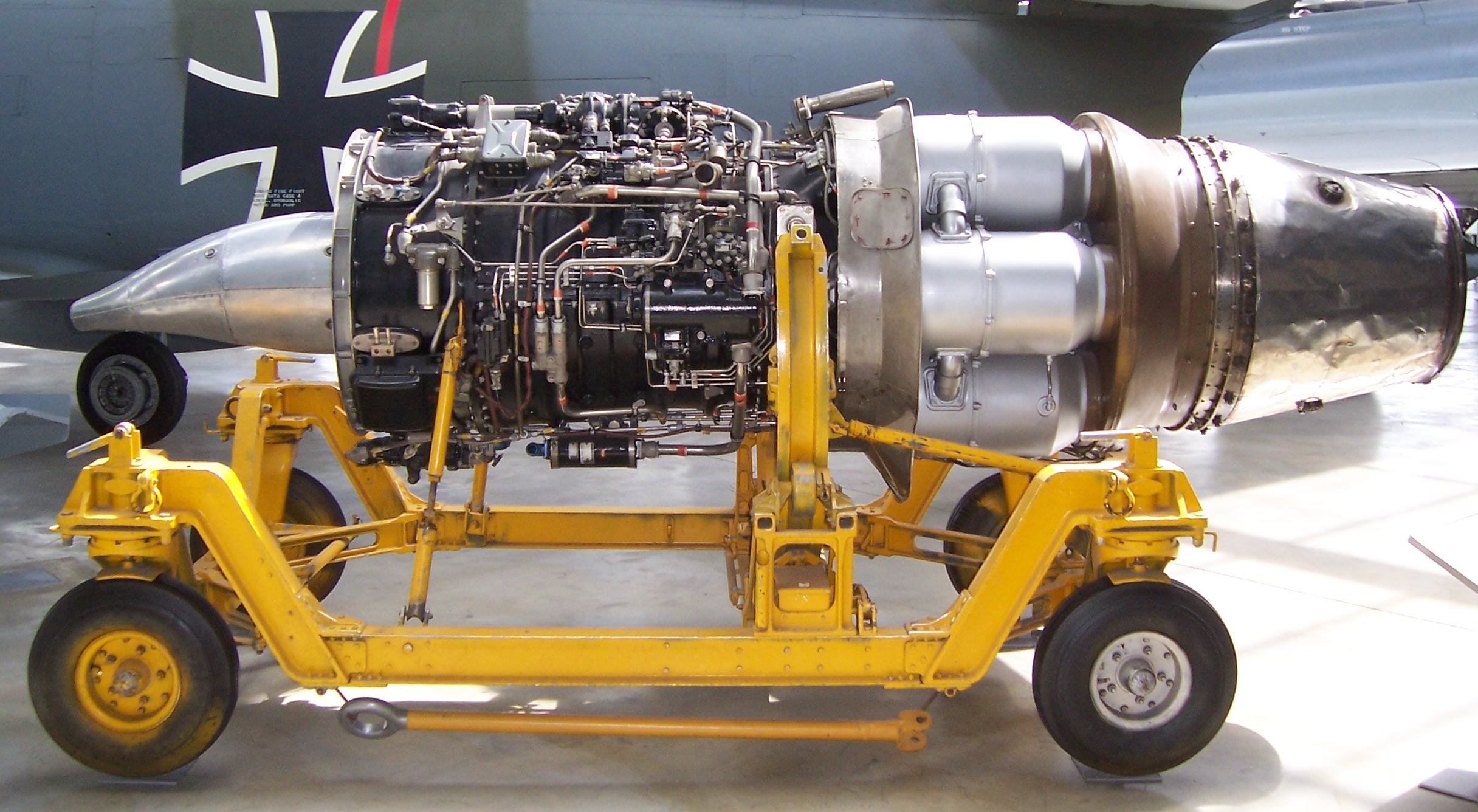 Avro Canada Orenda 14 in der Flugwerft Schleißheim